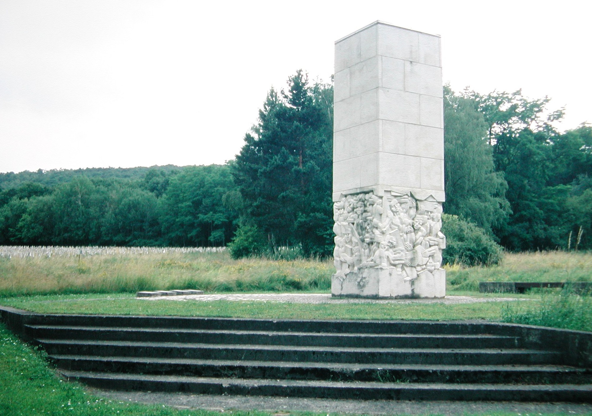 Concentratiekamp Langenstein-Zwieberge Categorie:Wikipedia:Afbeeldingen/Gebruiker:P.H. Louw Categorie:Afbeelding Duitsland